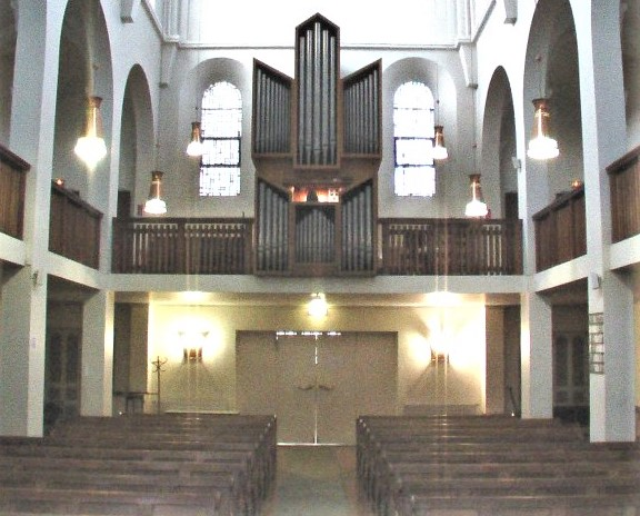 Christuskirche Paris, église évangélique allemande, orgue de Detlef Kleuker en 1964.